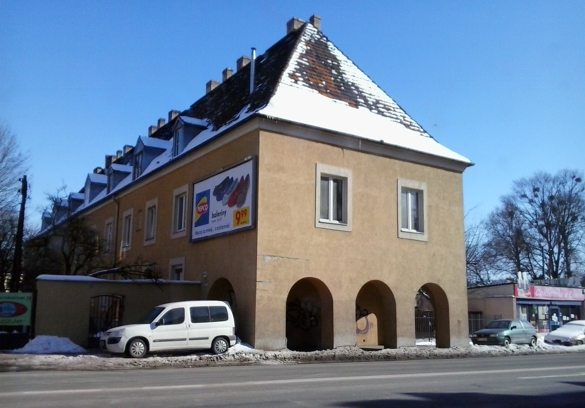 Poznań. Ulica Nad Wierzbakiem.